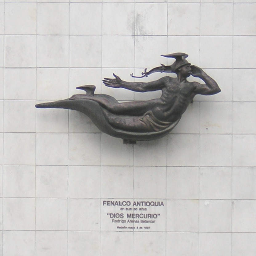 "Dios Mercurio", Escultura de Rodrigo Arenas Betancur, Medellín, Colombia.